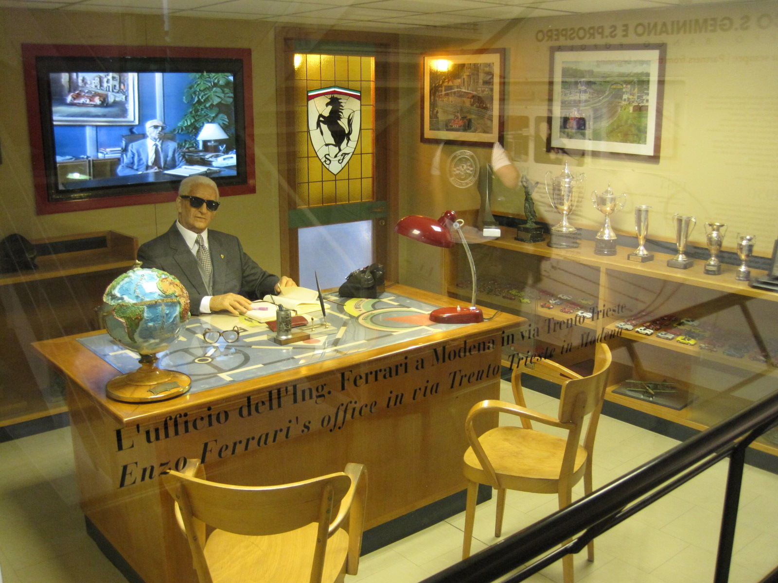 Galleria Ferrari - Bureau historique d'Enzo Ferrari